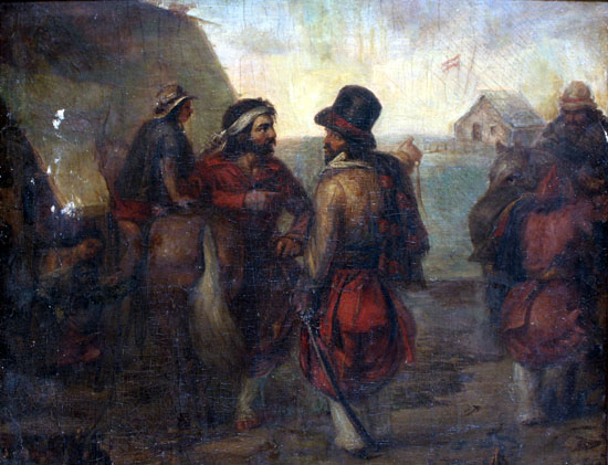 Foto: © Museo Histórico Nacional de Buenos Aires